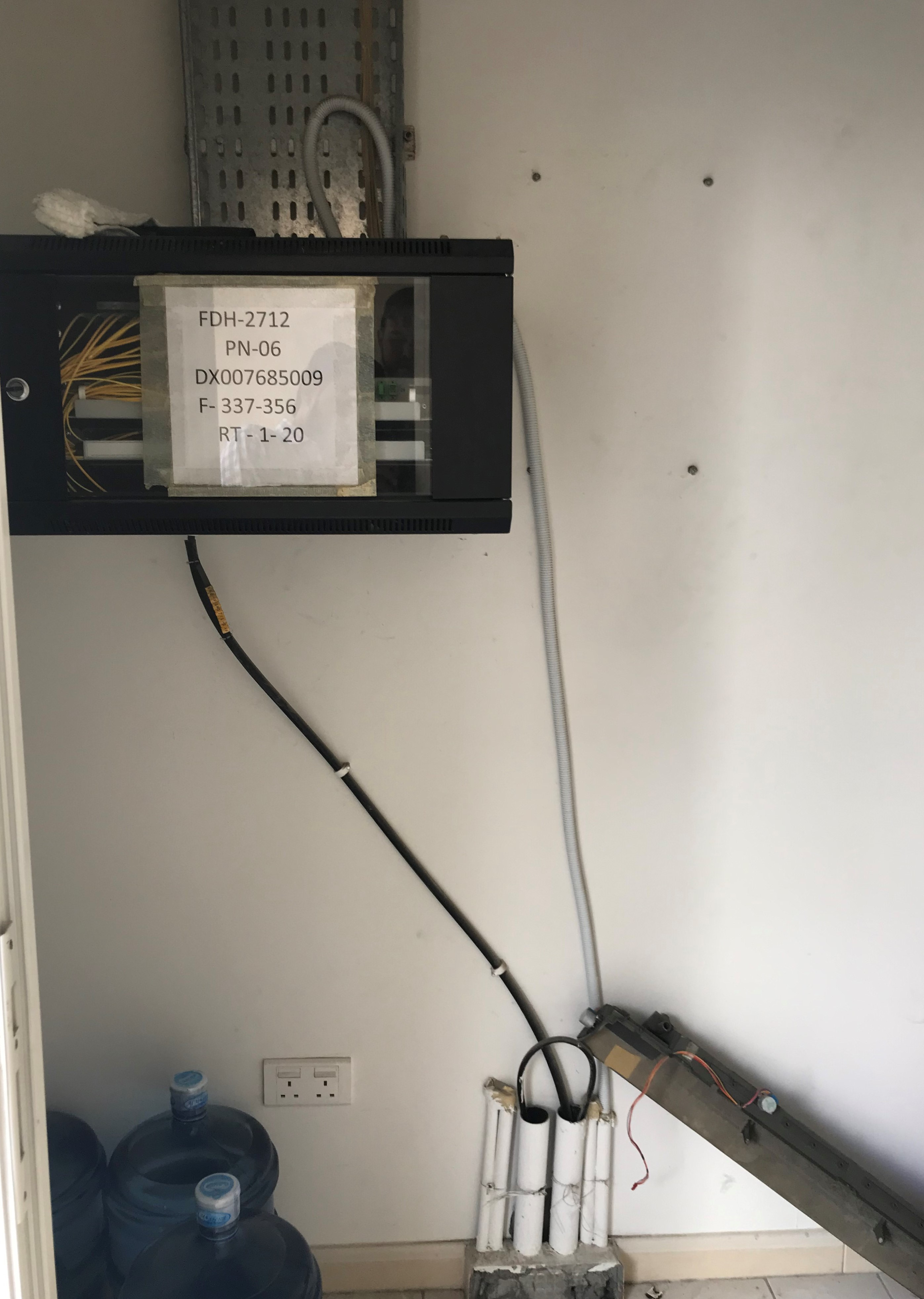 എത്തിസലാത്തിന്റെ ഫൈബർ ടു ദ് പ്രെമിസെസ് സേവനത്തിൽ ഉൾപ്പെടുന്ന ടെലികോം മുറിയും ക്യാബിനറ്റും.